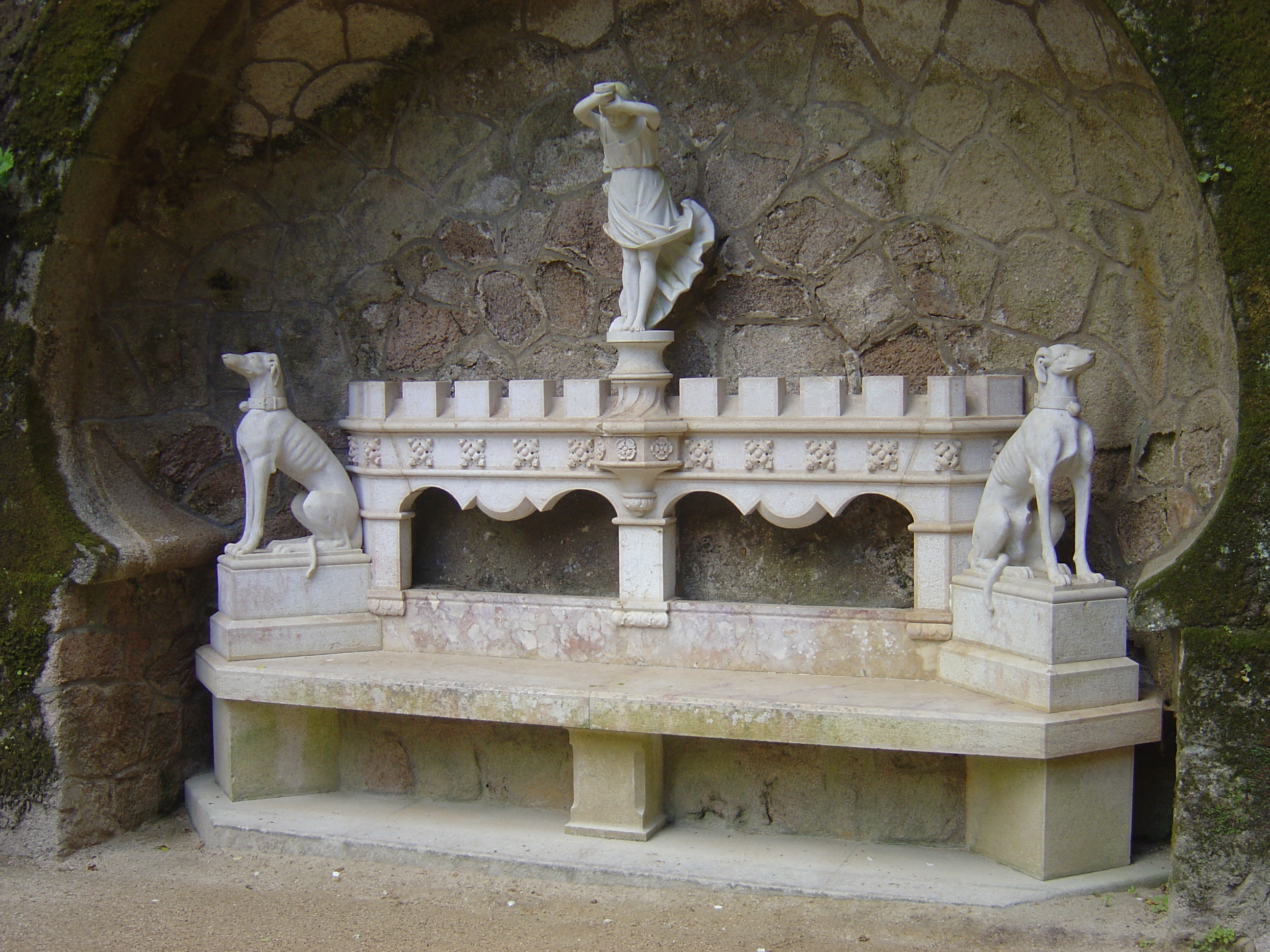 Quinta da Regaleira, Sintra, Portugal